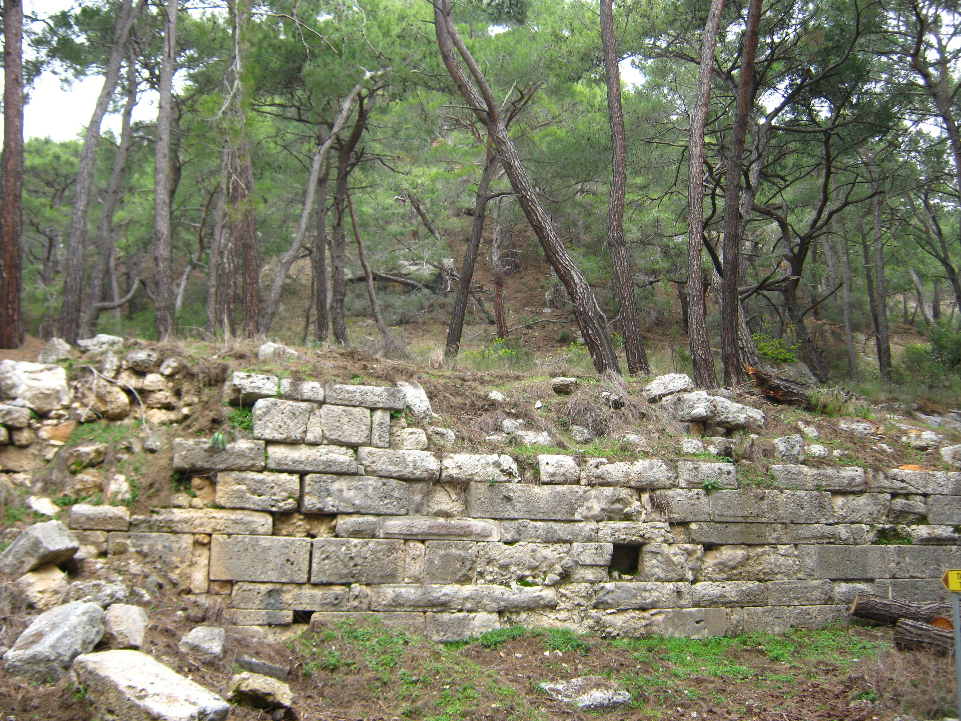 Фаселіс. Платформа античного храму